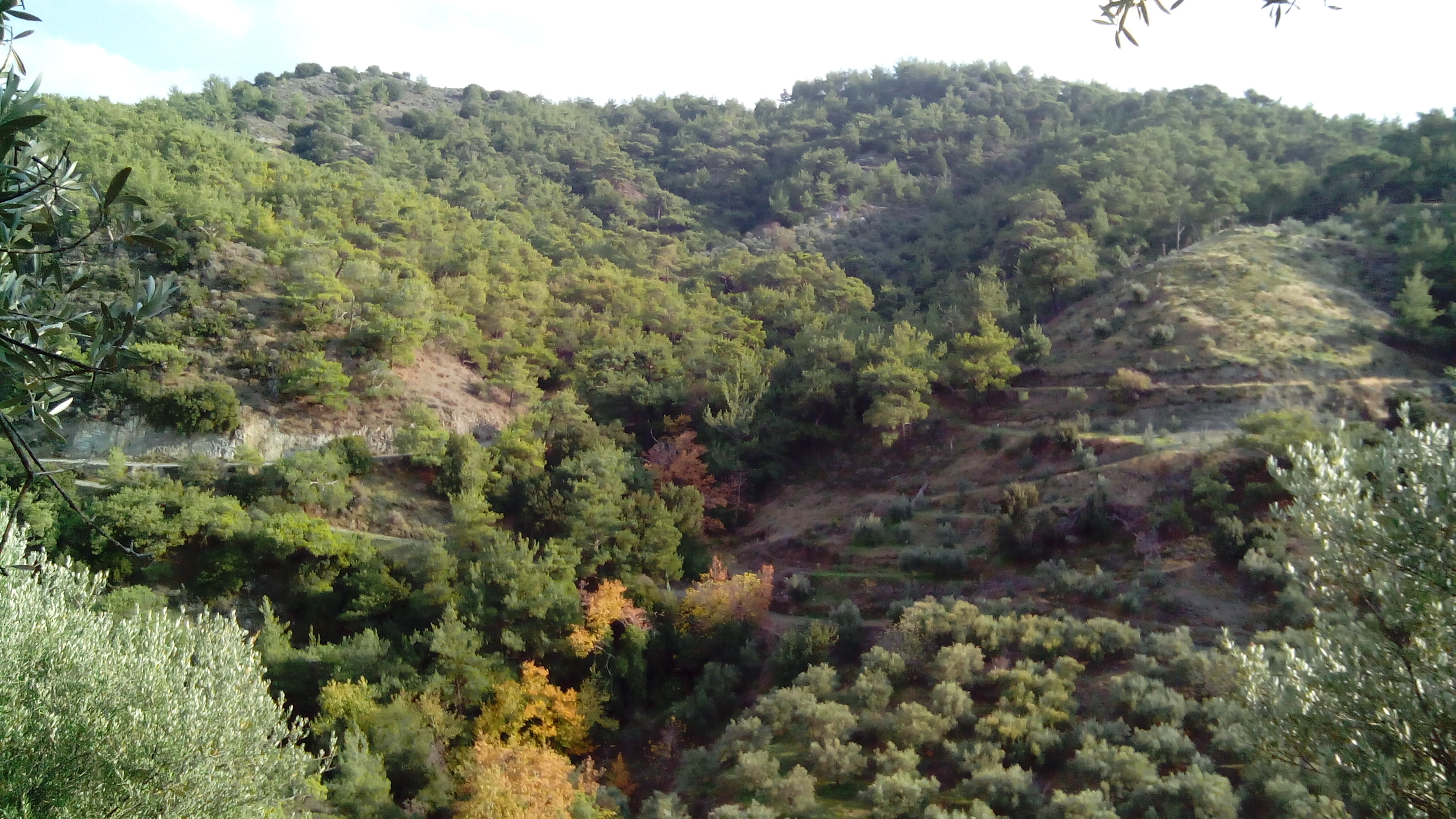 Πλατύακος, ο πευκόφυτος λόφος πάνω από το ποτάμι με τα πολύχρωμα δέντρα, στον Άγιο Βασίλειο!